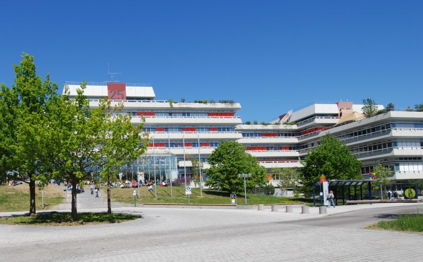 Standort des kiz im Gebäude O26 der Universität Ulm auf dem Campus Ost.